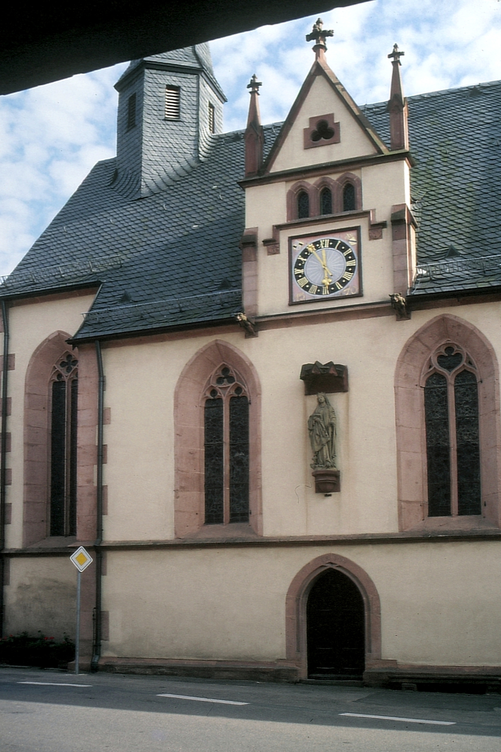 Katharinenkapelle (Külsheim)